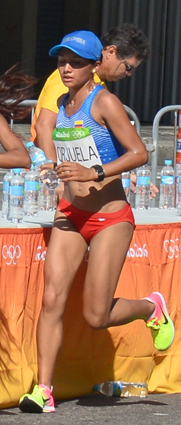 Passage du marathon des jeux olympiques de Rio 2016 dans le centre de Rio